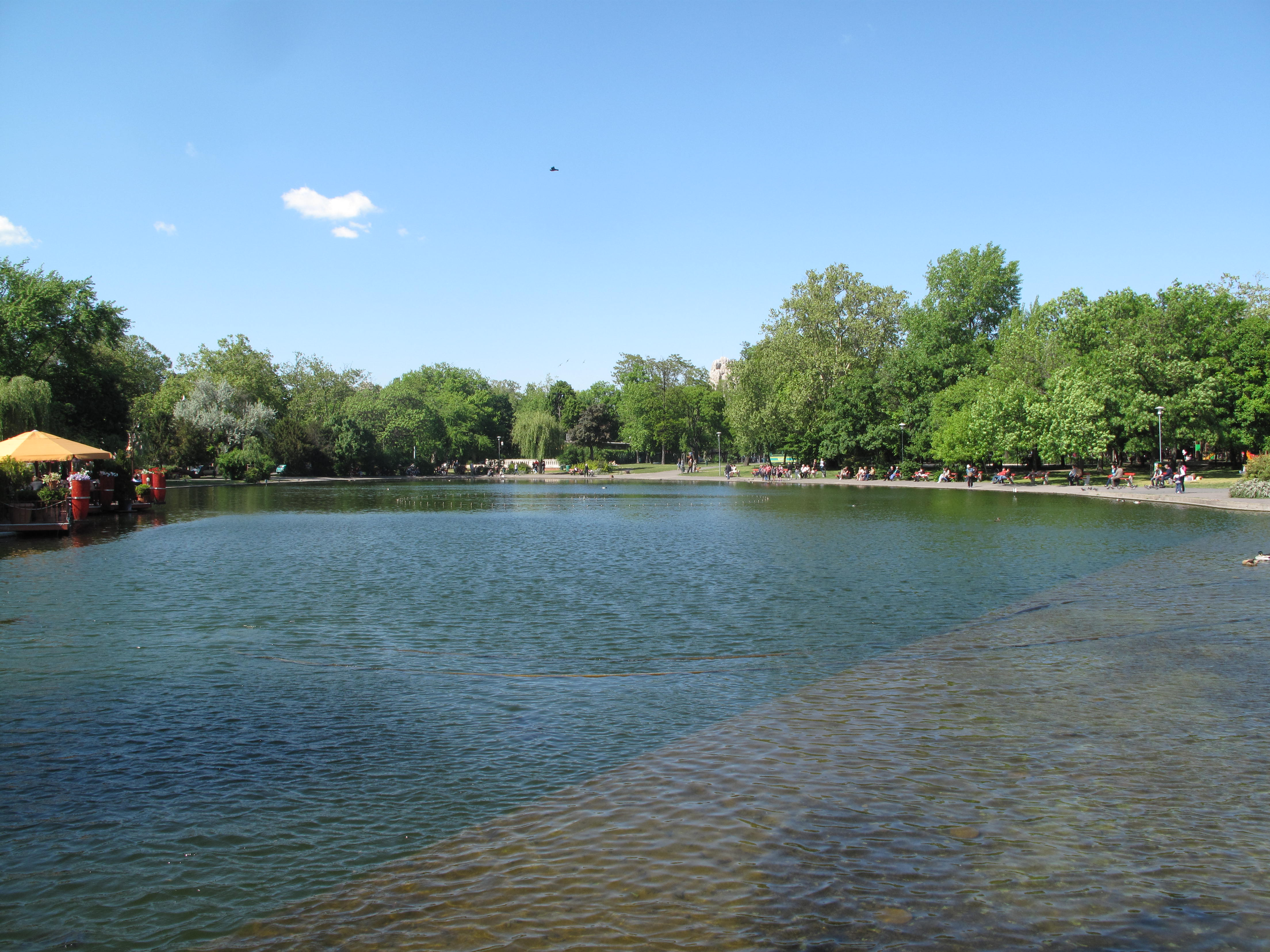 Budapešť